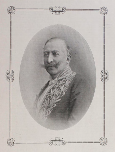 Fotografía del General Rafael Reyes, Presidente de la República de Colombia